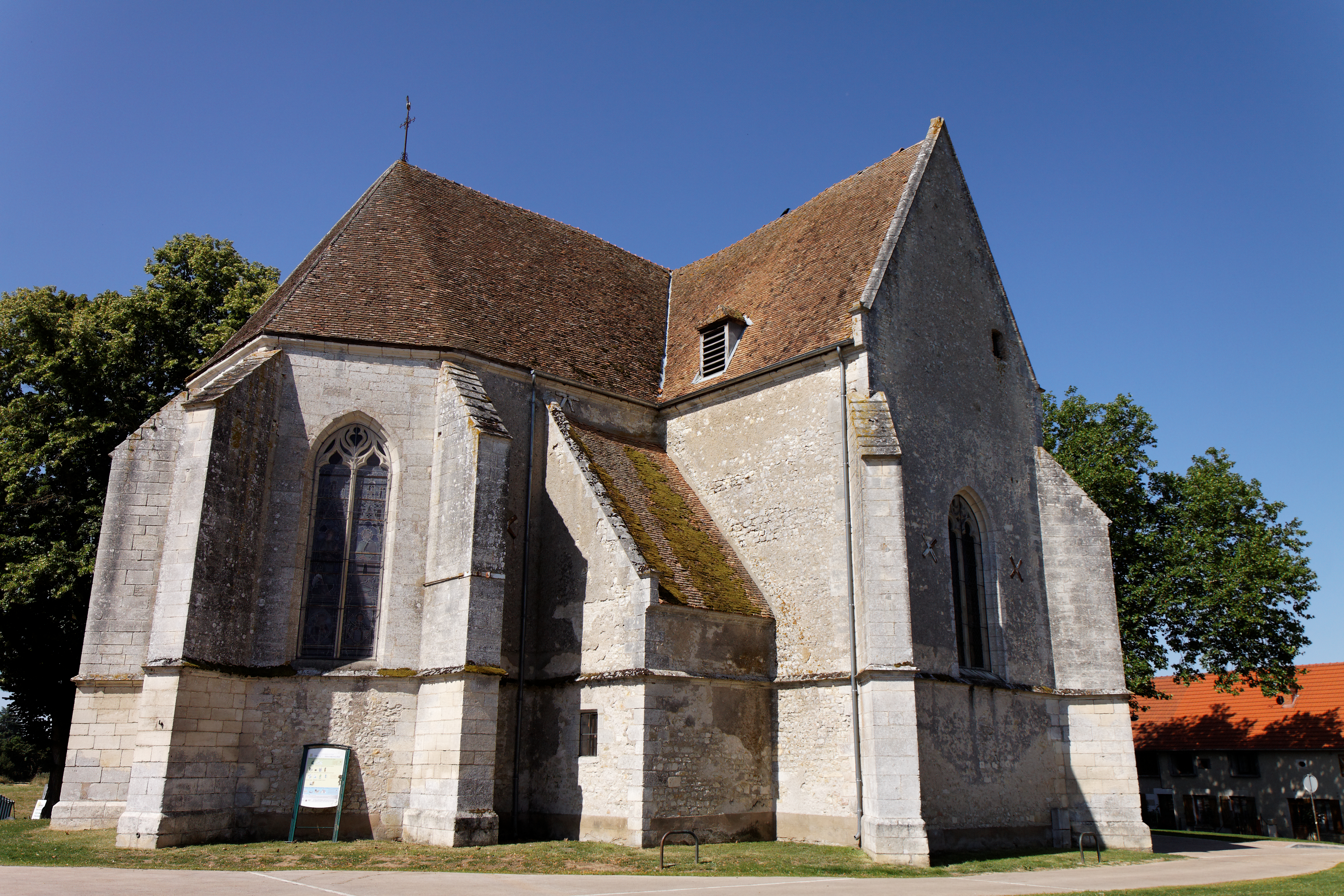 Eglise de l'ancienne commune de Cours.